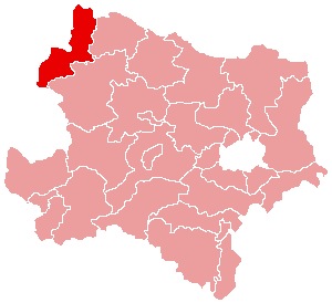 Karte: politischer Bezirk Gmünd Lizenz: GNU FDL Quelle: Zeichnung plp Datum: de:2004 Ort: Wien